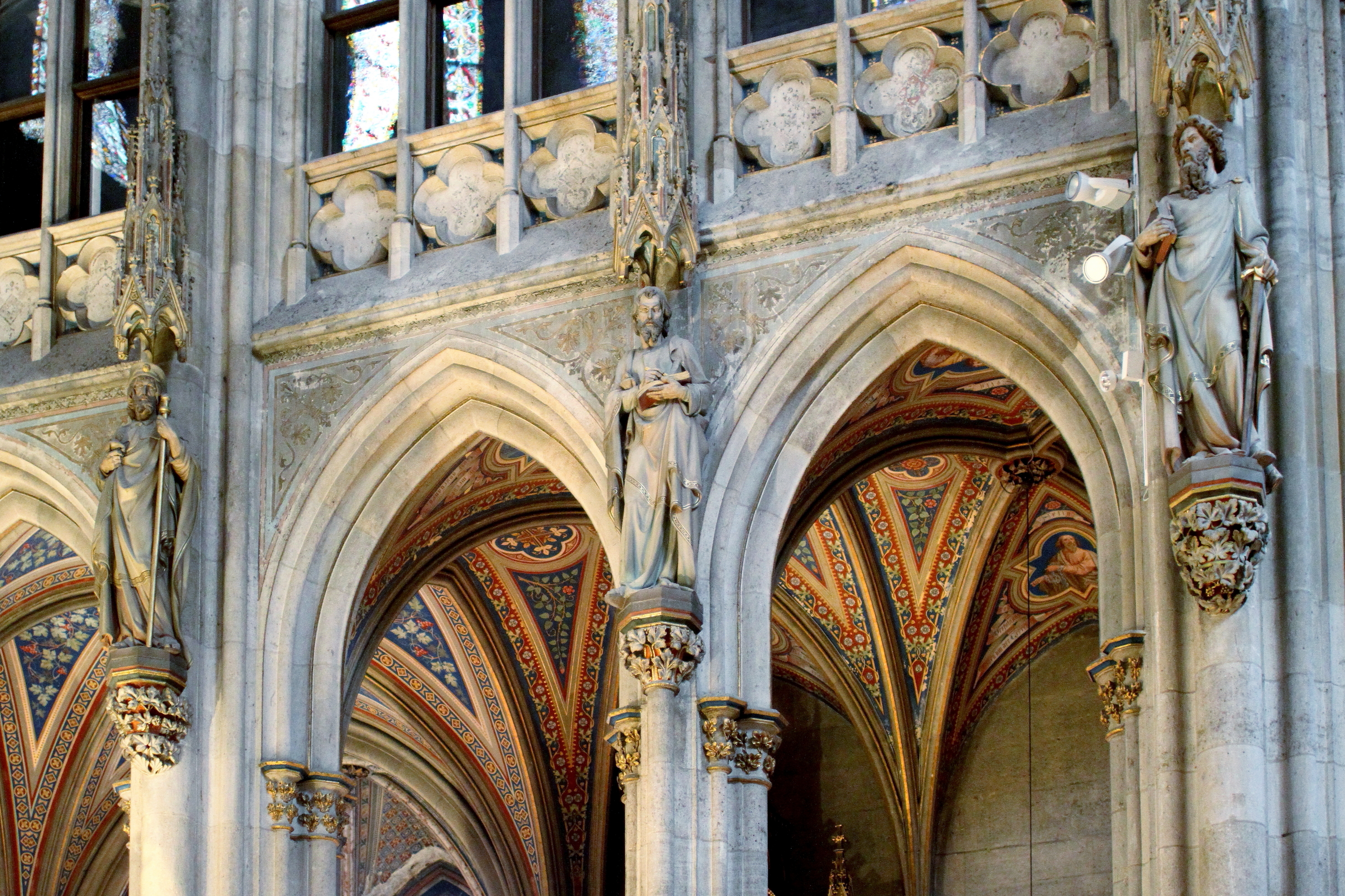 Aposteln an den Chorpfeilern der Wiener Votivkirche. Vom Bildhauer Franz Christoph Erler in den Jahren 1875 bis 1877 geschaffen.